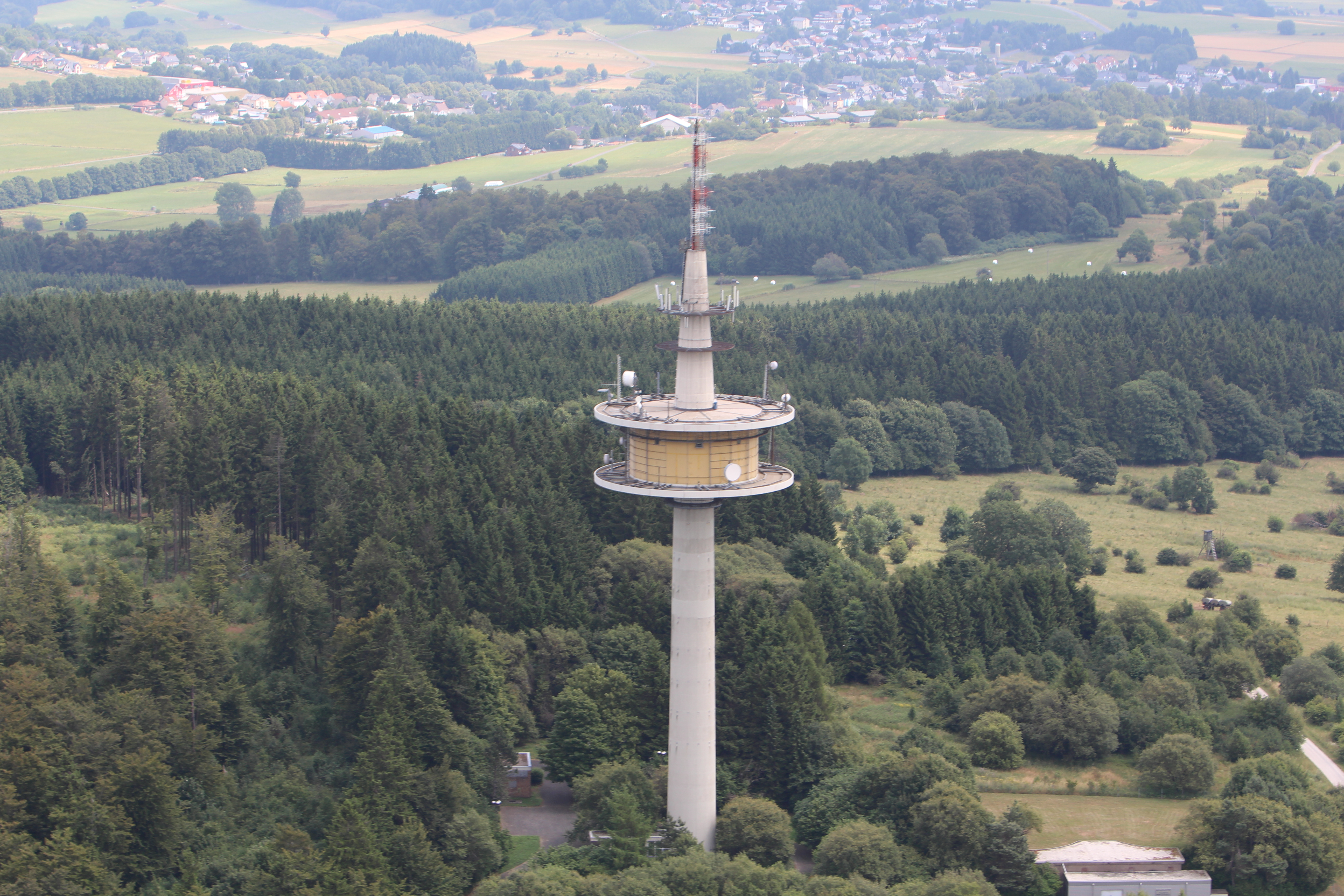 Fernmeldeturm Höllberg/Westerwald